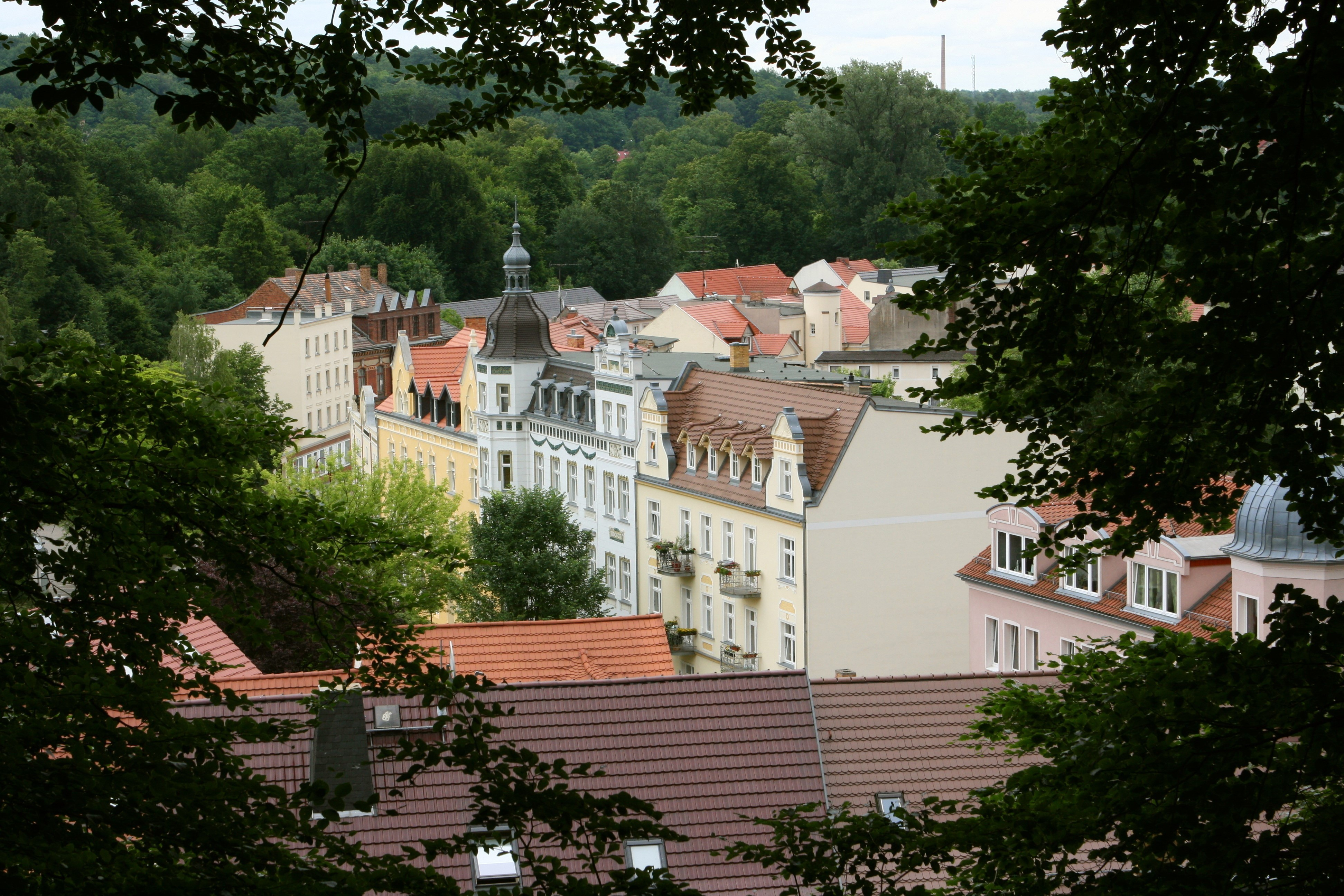 Blick vom Oberweg auf Bad Muskau